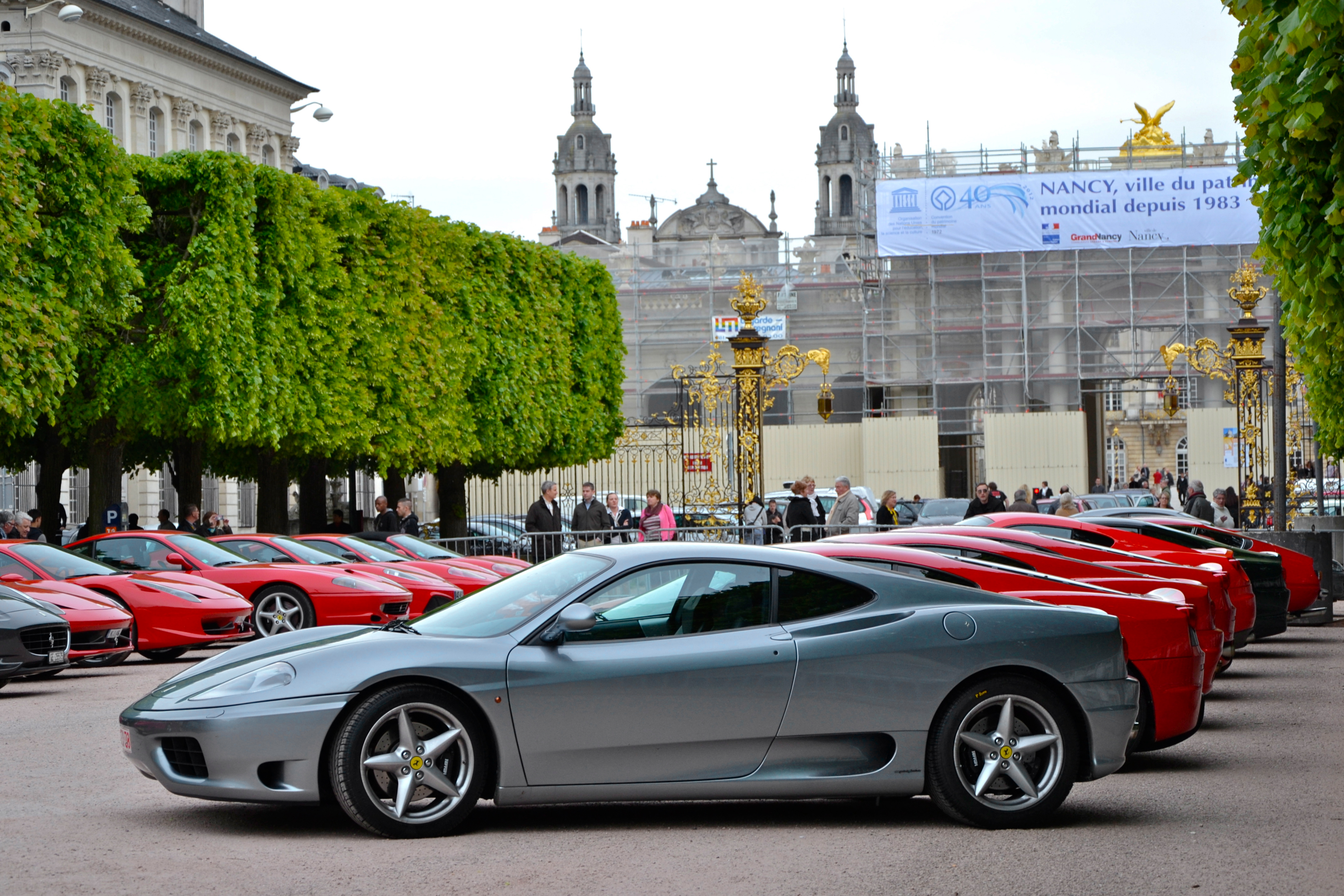 Ferrari Club France